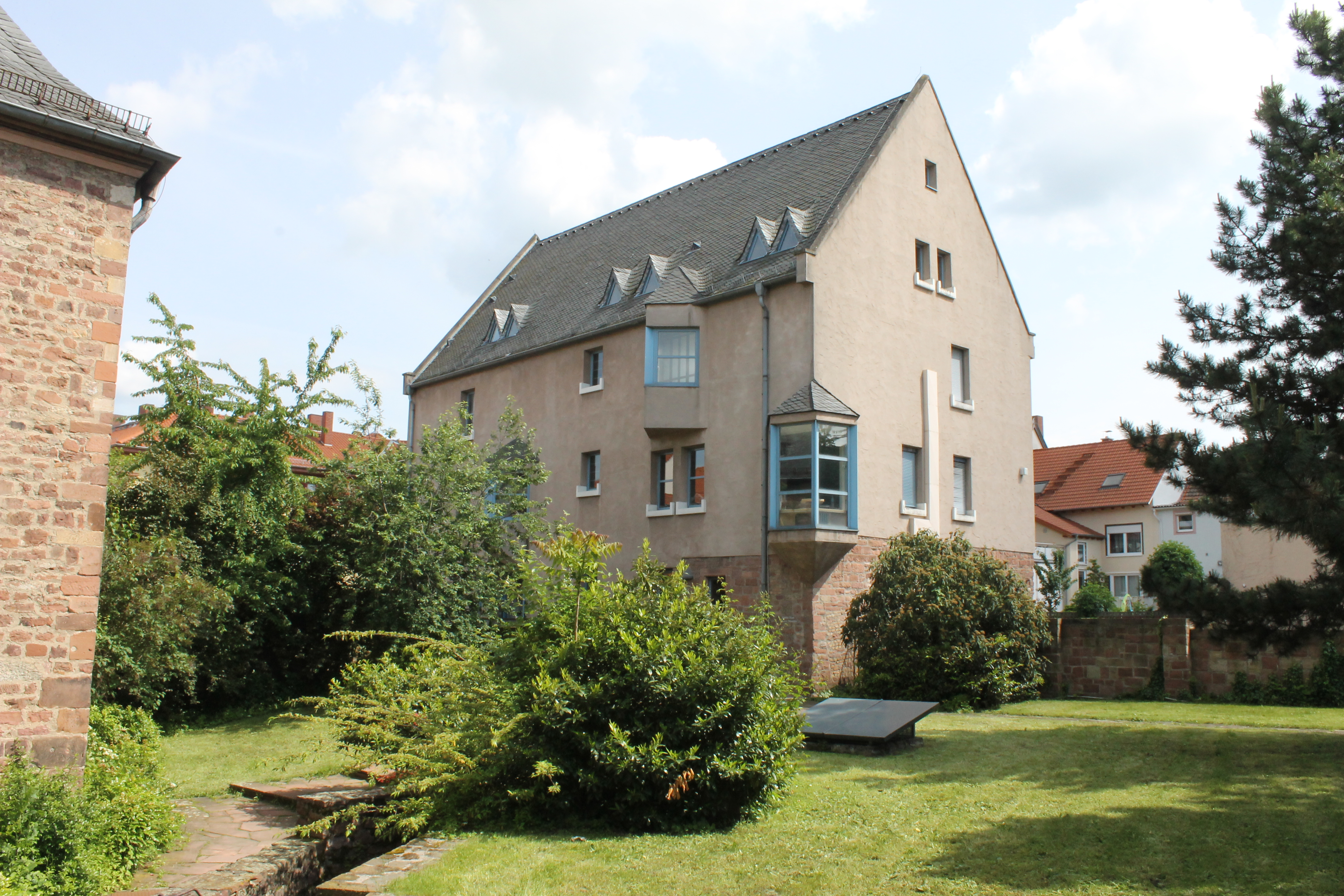 Das Raschi-Haus Worms aus Sicht des Synagogengarten.